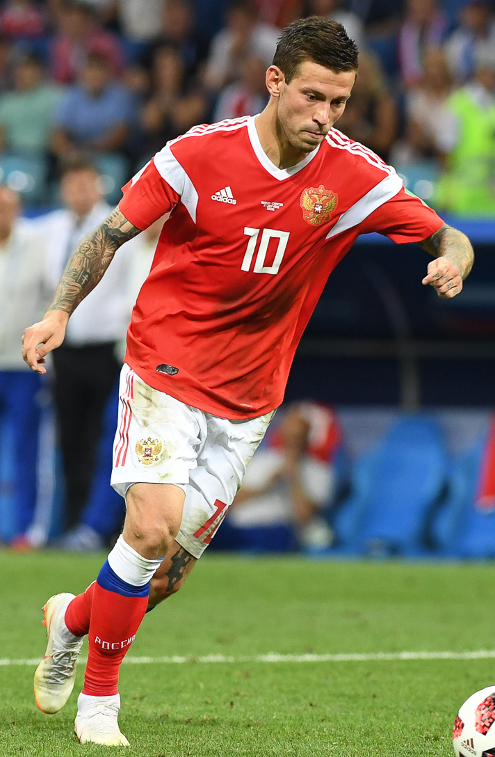 Сборная России заканчивает ЧМ-2018 с поднятой головой. Хорватия выходит в полуфинал